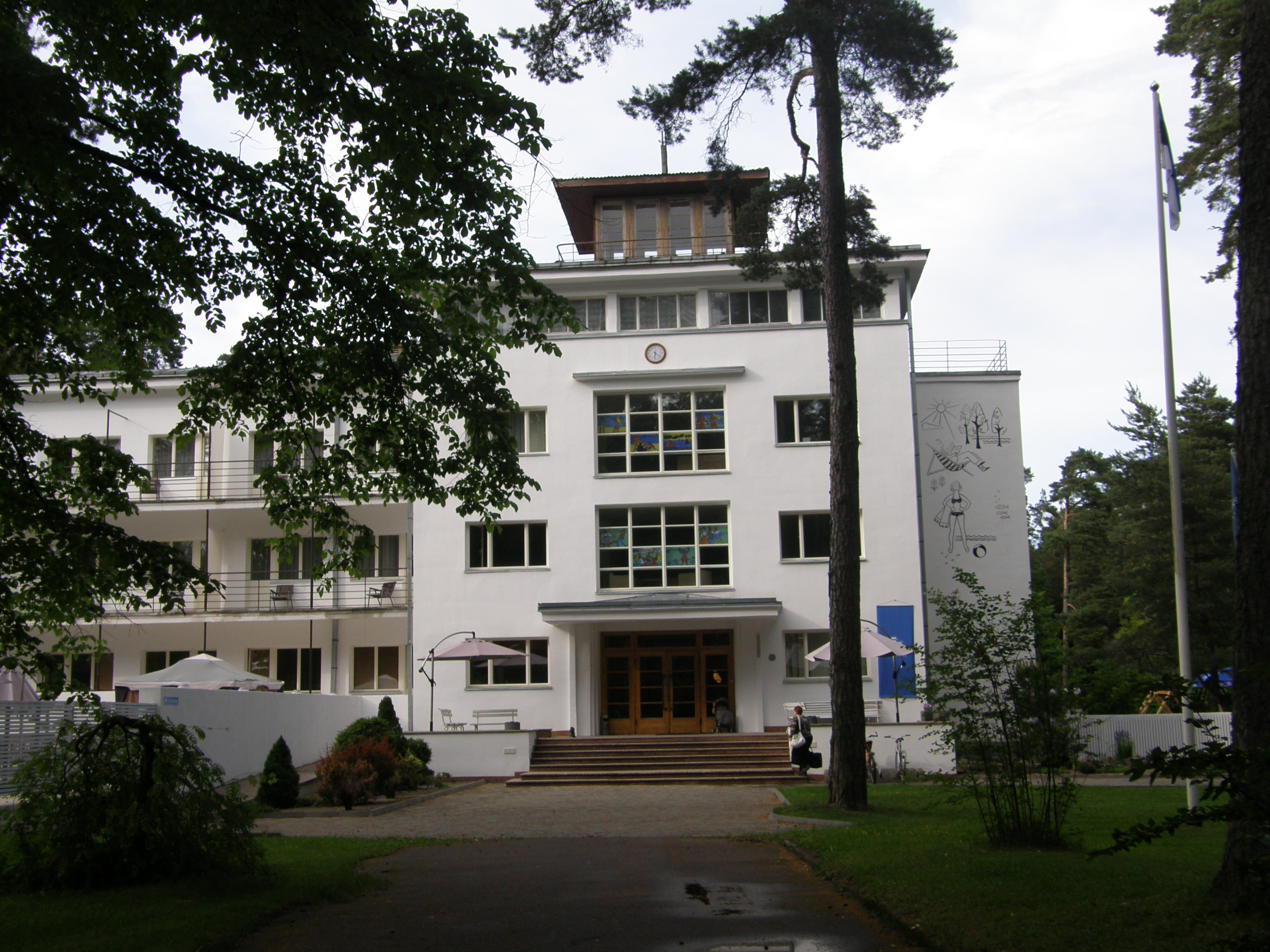 Narva-Jõesuu sanatooriumi peakorpus